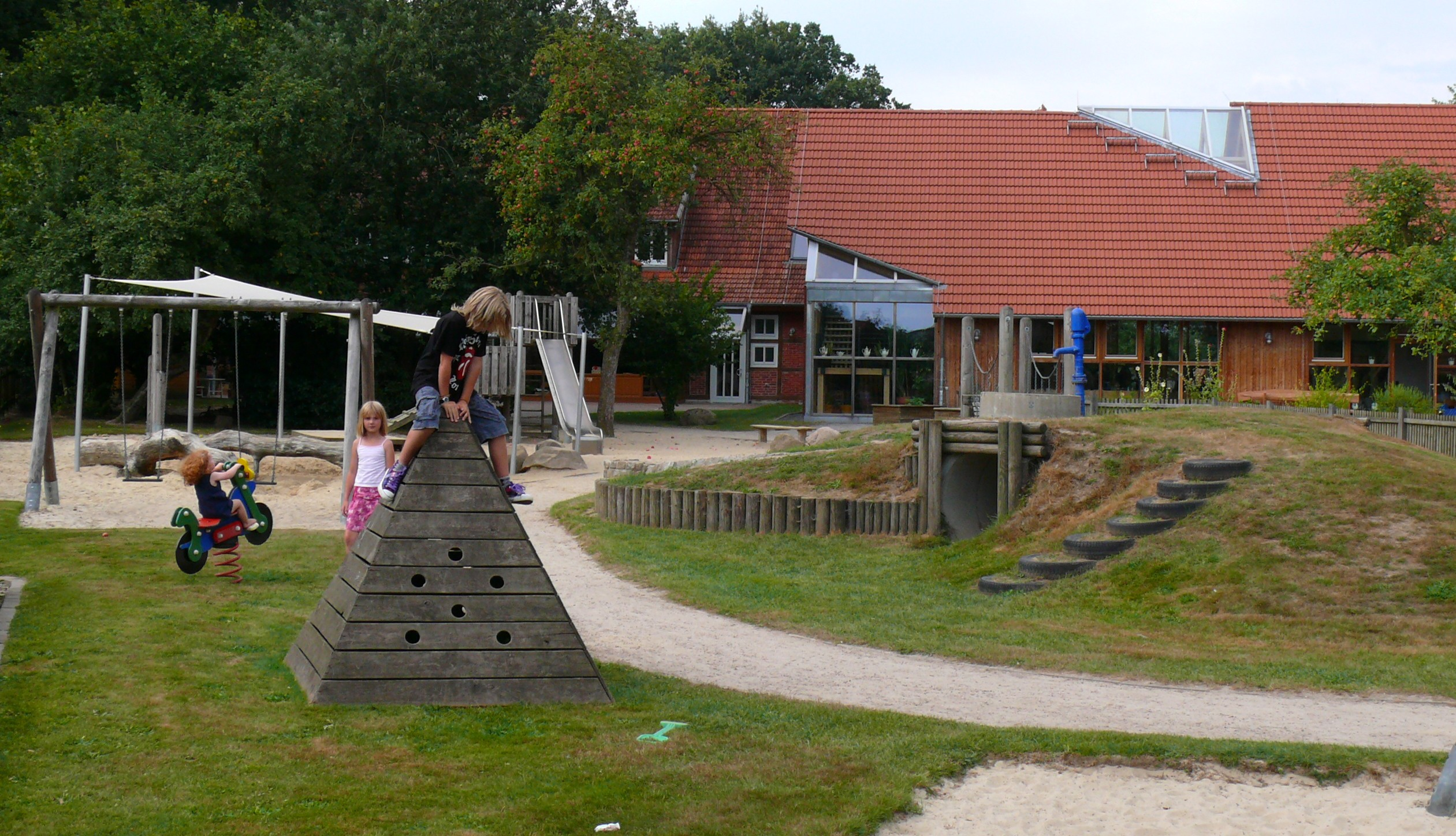 Mehrgenerationenhaus in Waffensen/Rotenburg (Wümme) vom Spielplatz her fotografiert